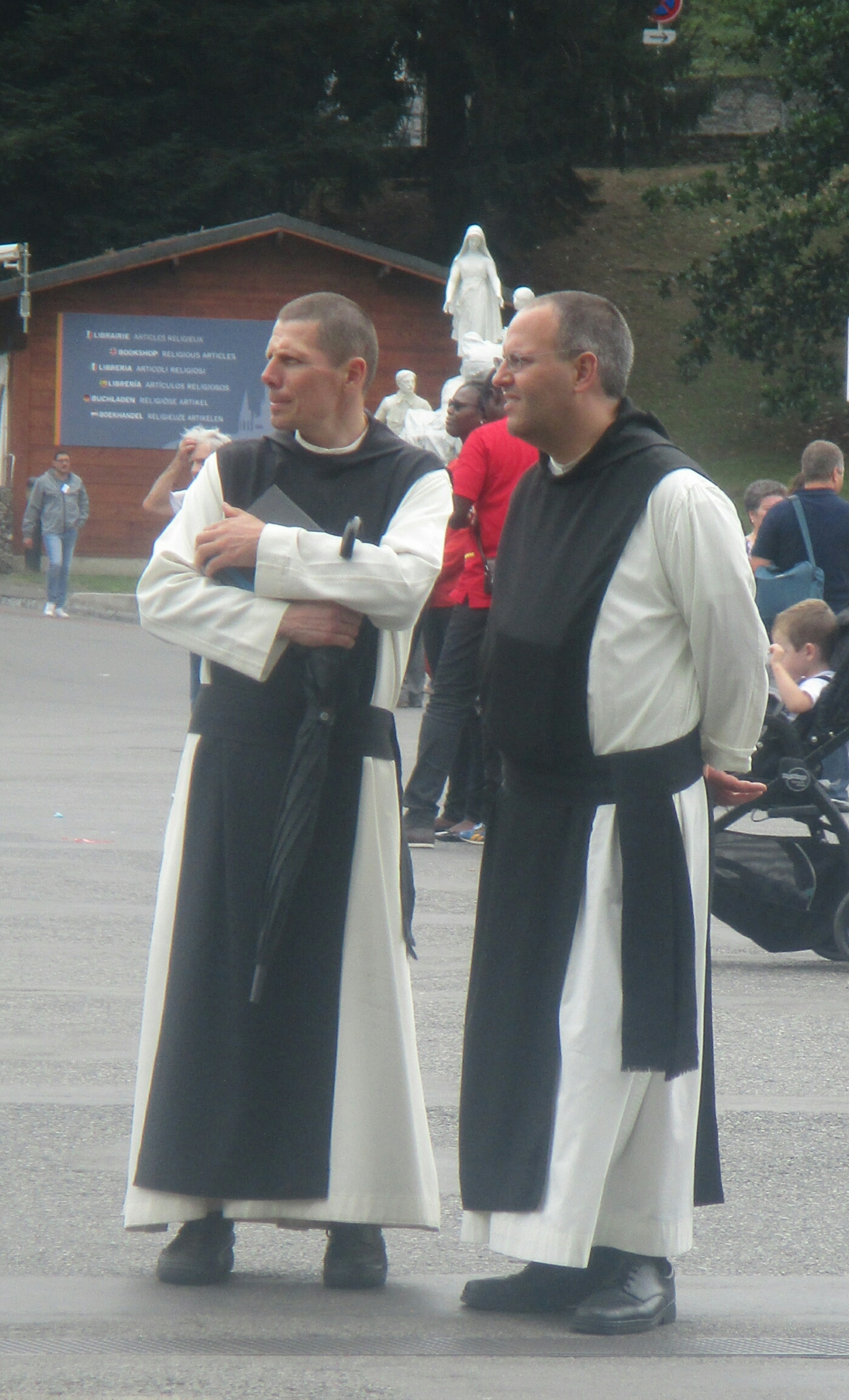 Moines cisterciens espagnols à Lourdes en août 2019.